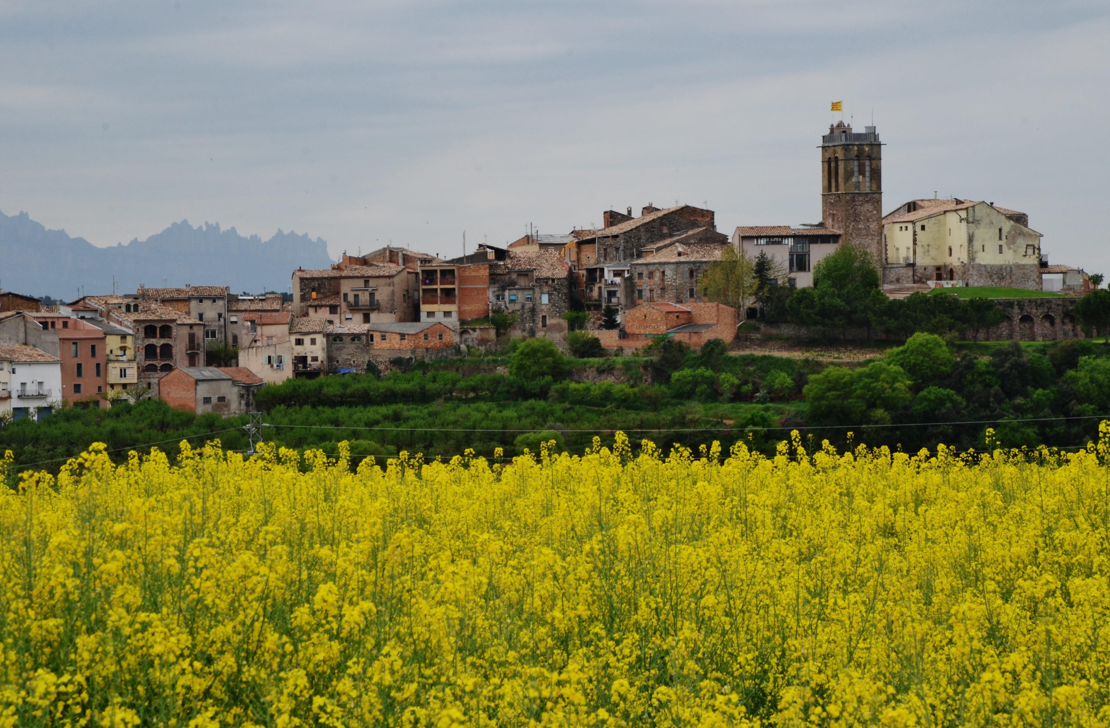 Castell d'Artés